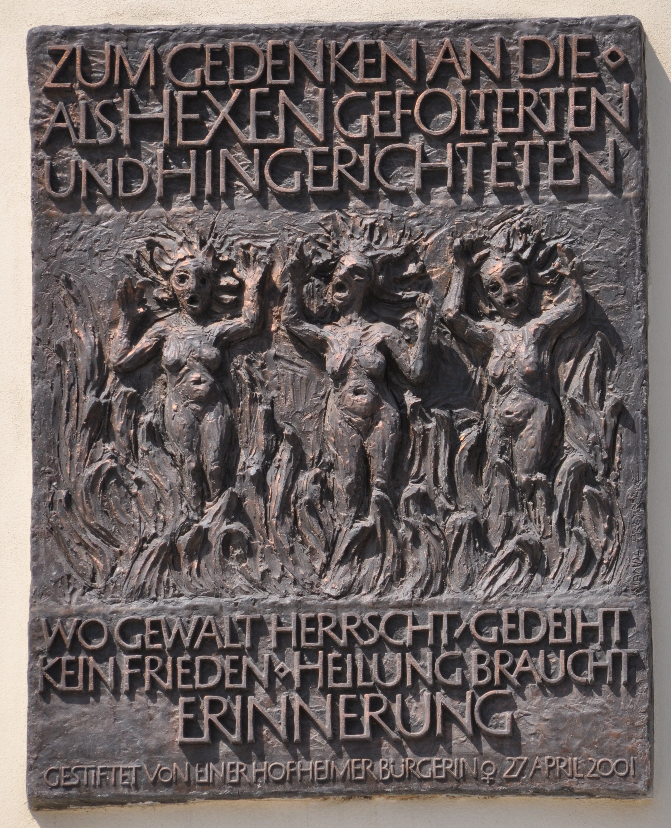 Gedenktafel am Hexenturm in Hofheim am Taunus